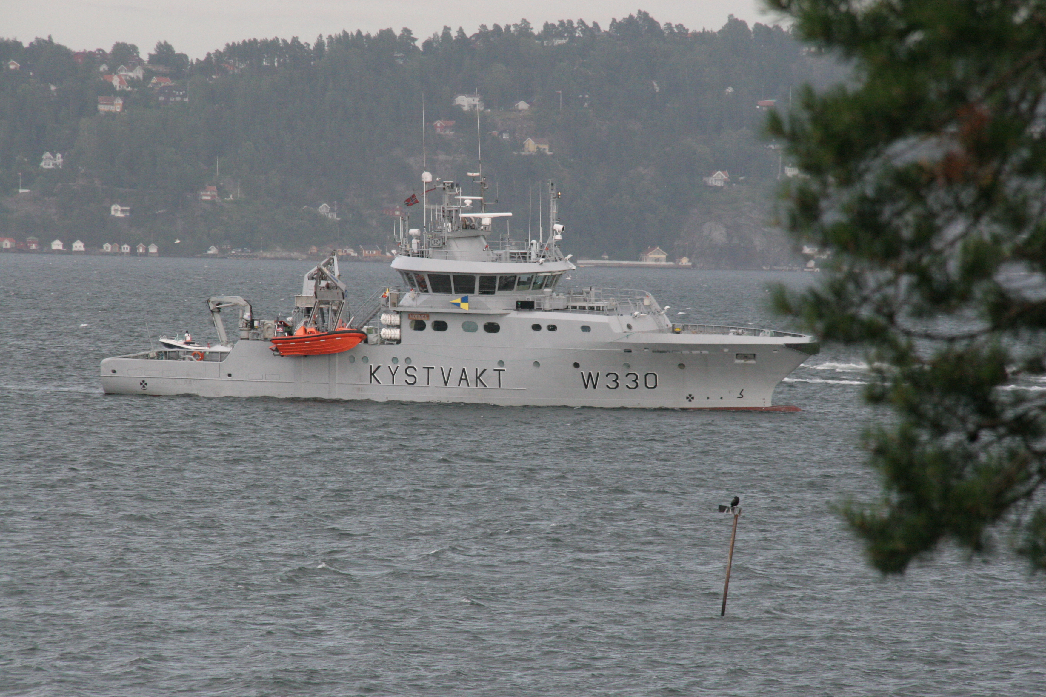 Kystvakten passer på